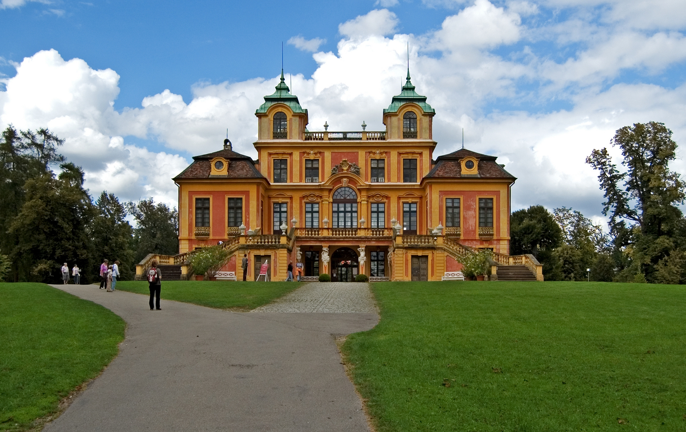 Schloss Favorite in Ludwigsburg bei Baden-Württemberg.